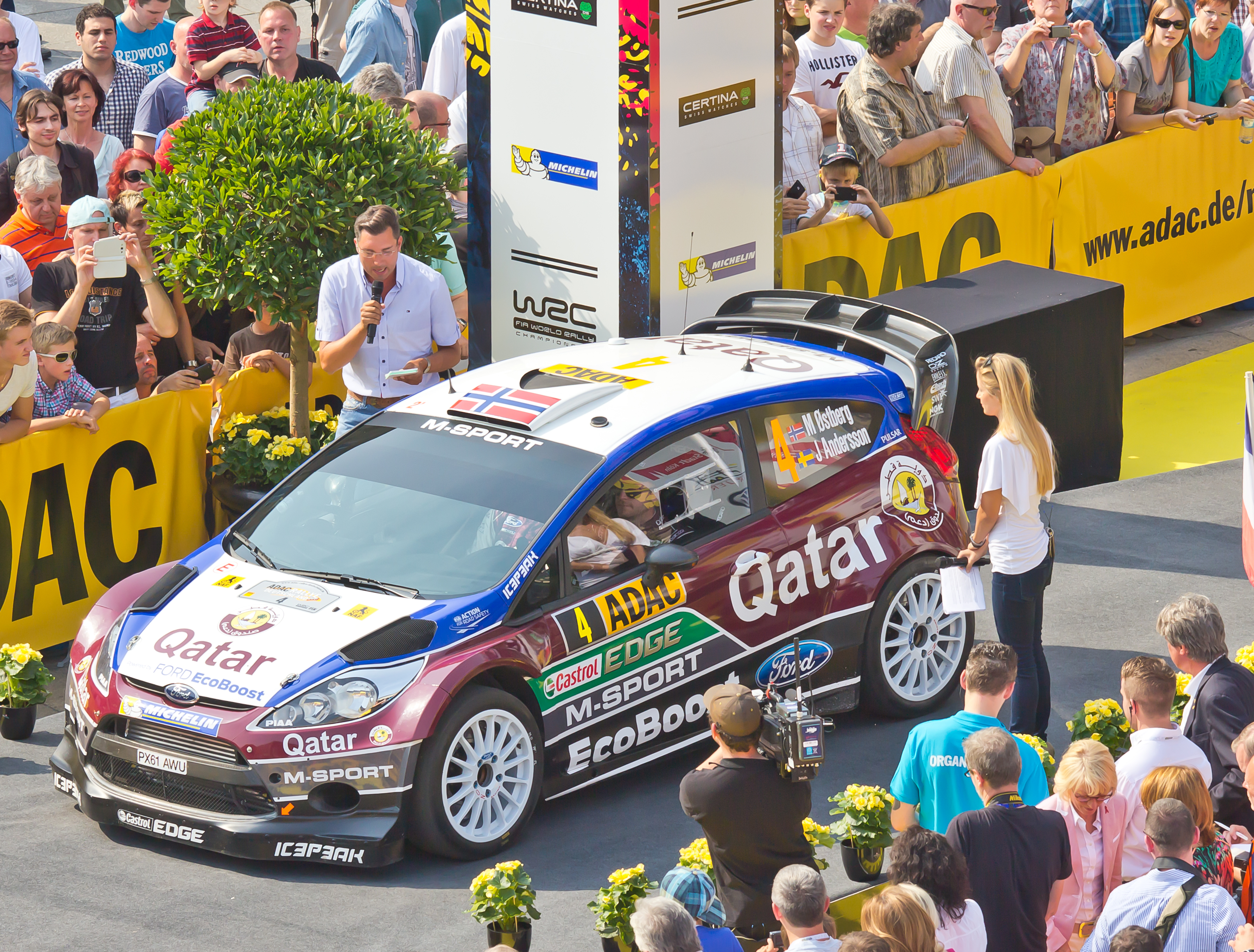 ADAC Rallye Deutschland 2013 - Fahrerpräsentation auf dem Roncalliplatz. Qatar M-Sport Rally Team mit dem Fahrer Mads Østberg und Co-Fahrer Jonas Andersson im Ford Fiesta RS WRC